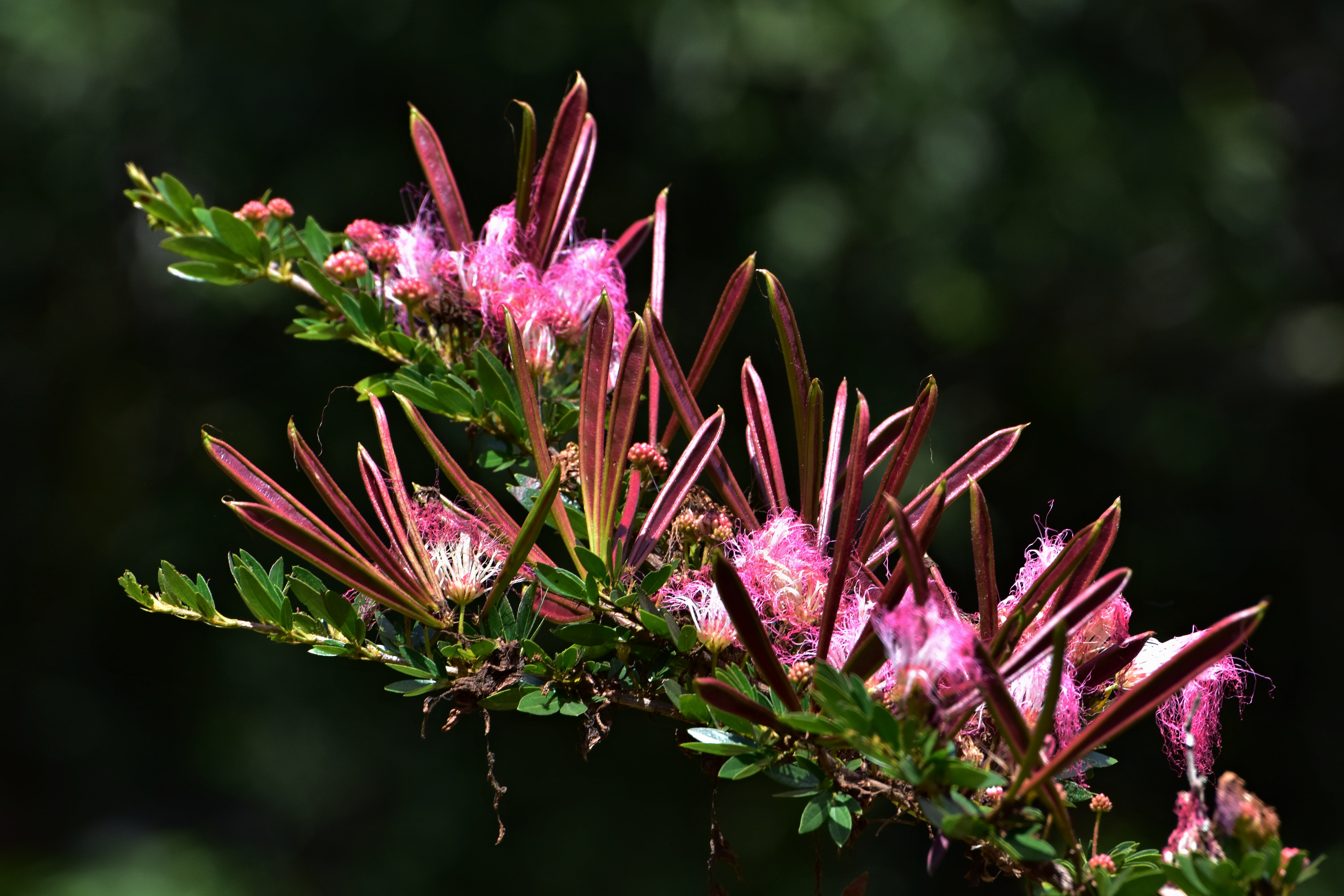 Carbón (Calliandra angustifolia)